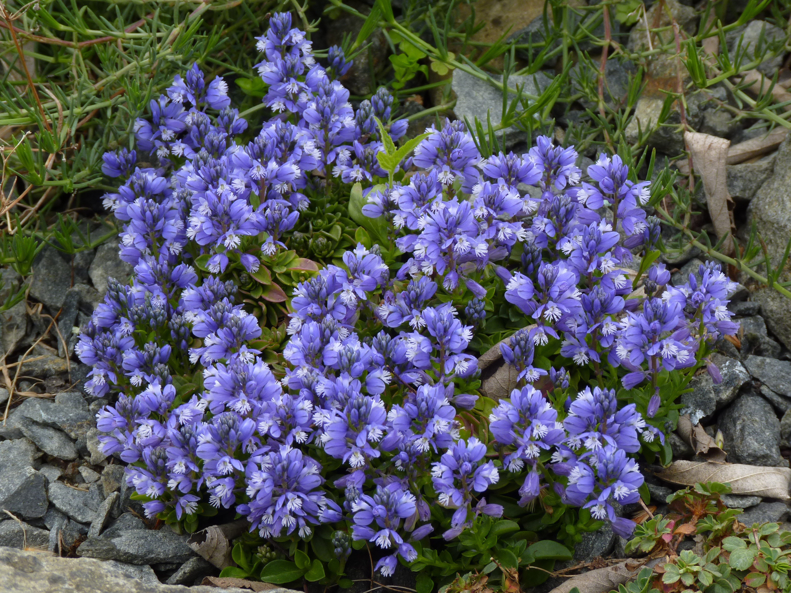 Polygala calcarea 'Lilliet'